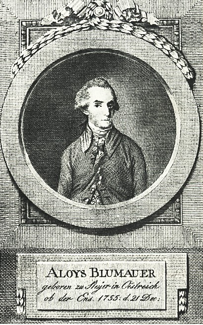 Der Wiener Buchhändler und Parodist Johann Aloys Blumauer